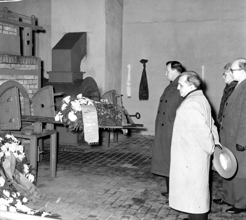 Zentralbild/Hesse, 29.11.1959 Luis Carlos Prestes besuchte Ravensbrück Der Generalsekretär der brasilianischen Kommunistischen Partei, Luis Carlos Prestes, besuchte am 28.11.1959 die nationale Mahn- und Gedenkstätte Ravensbrück. In dieses ehemalige Konzentrationslager hatten die Faschisten auch die tapfere Lebens- und Kampfgefährtin von Prestes, die deutsche Antifaschistin Olga Benario-Prestes verschleppt, die als Mitarbeiterin des Zentralkomittees des Kommunistischen Jugendverbandes stets für die Interessen der Arbeiterklasse eingetreten war. UBz: (Mitte, im Vordergrund): Luis Carlos Prestes; links: das Mitglied des ZK der KP Brasiliens, Luchesi, am Verbrennungsofen 69186/1N